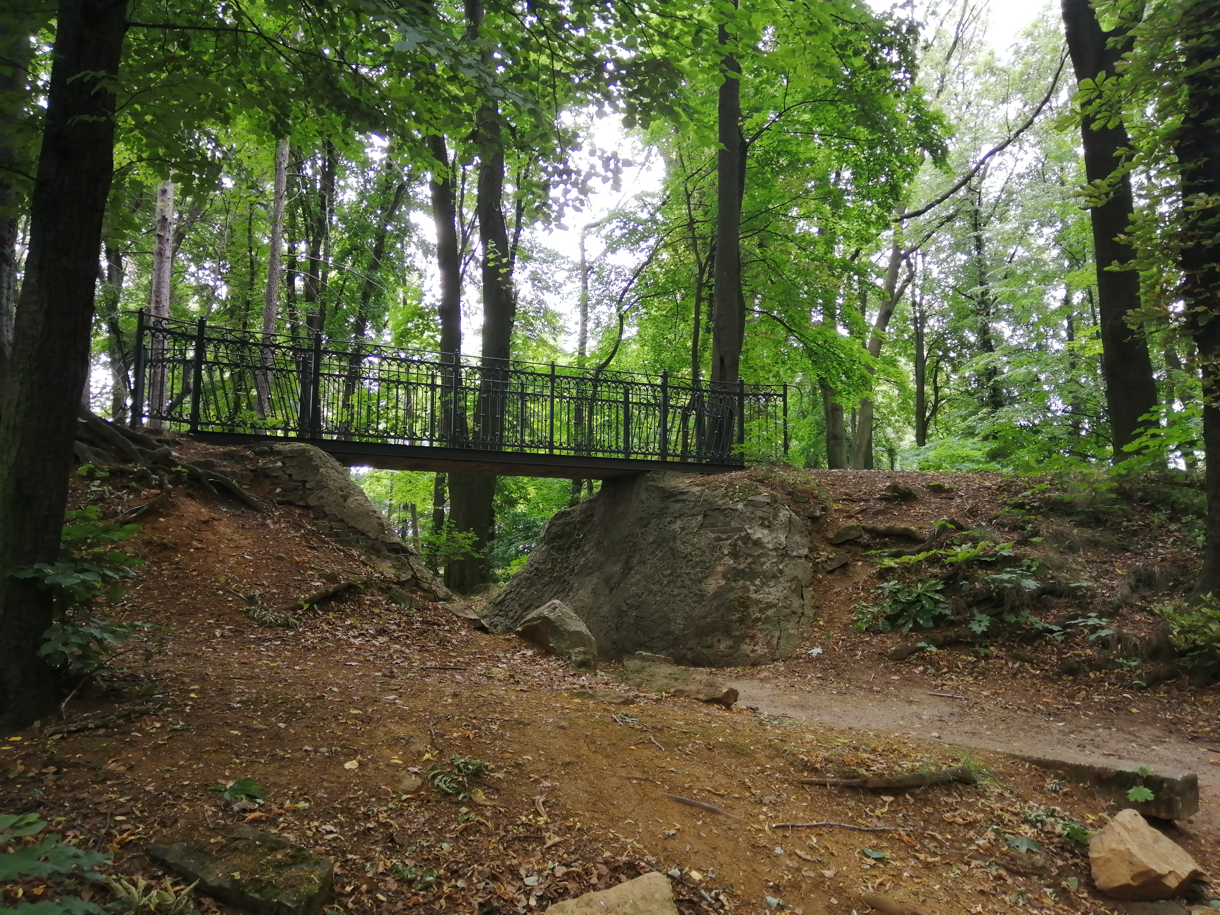 Park Ojców Kamilianów w Tarnowskich Górach - wąwóz z mostkiem